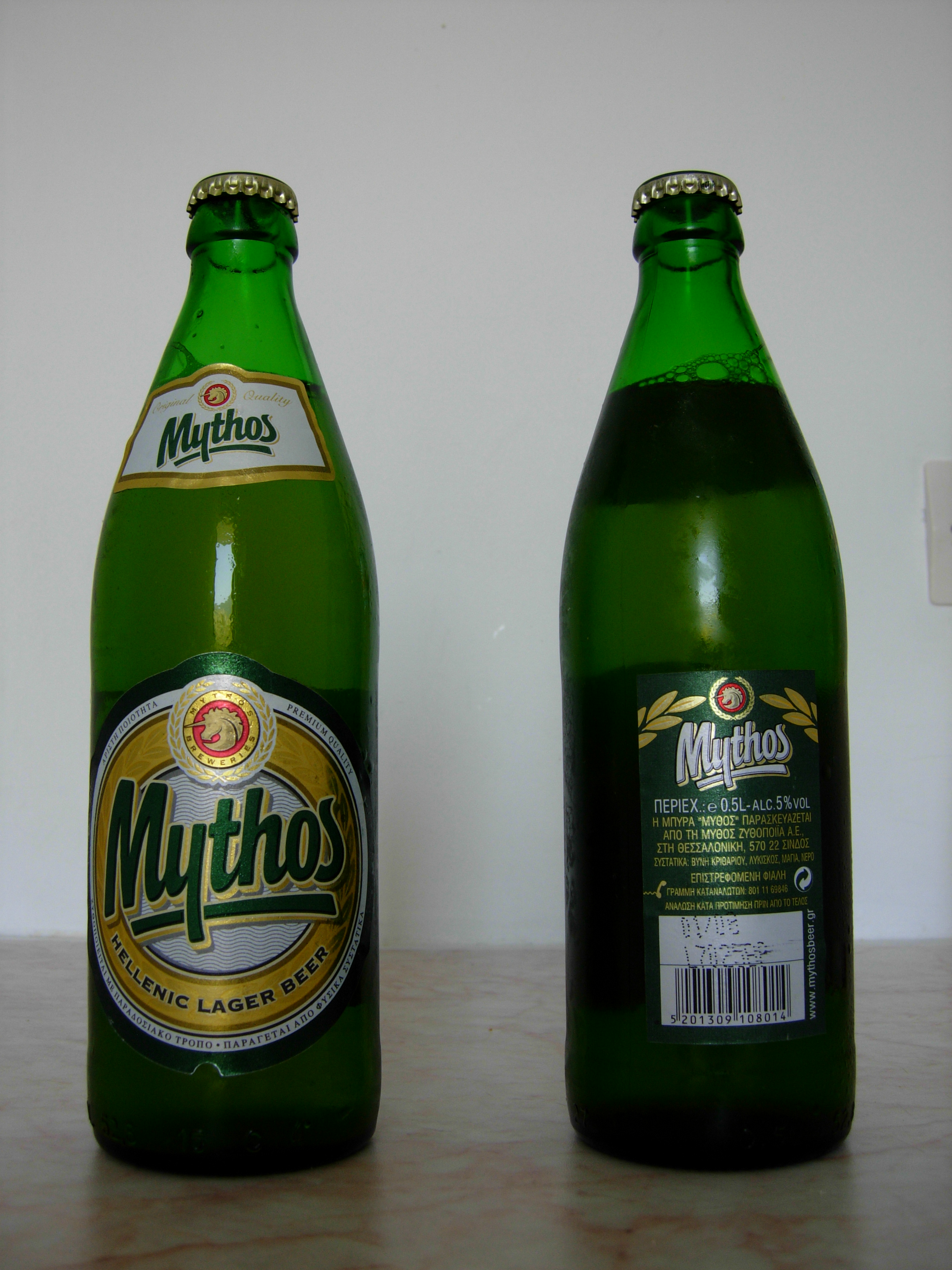 Pivo Mythos